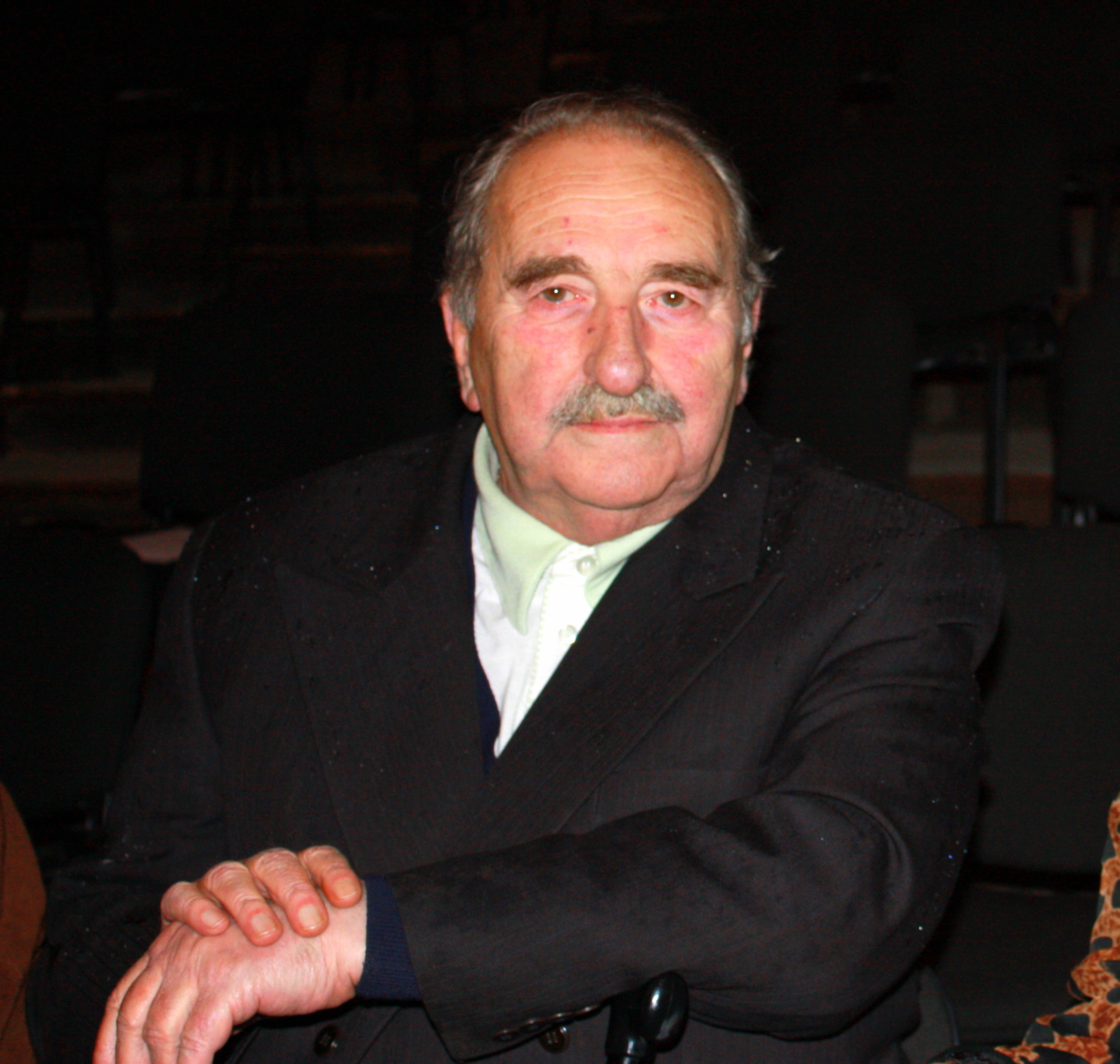 გიგა ლორთქიფანიძე